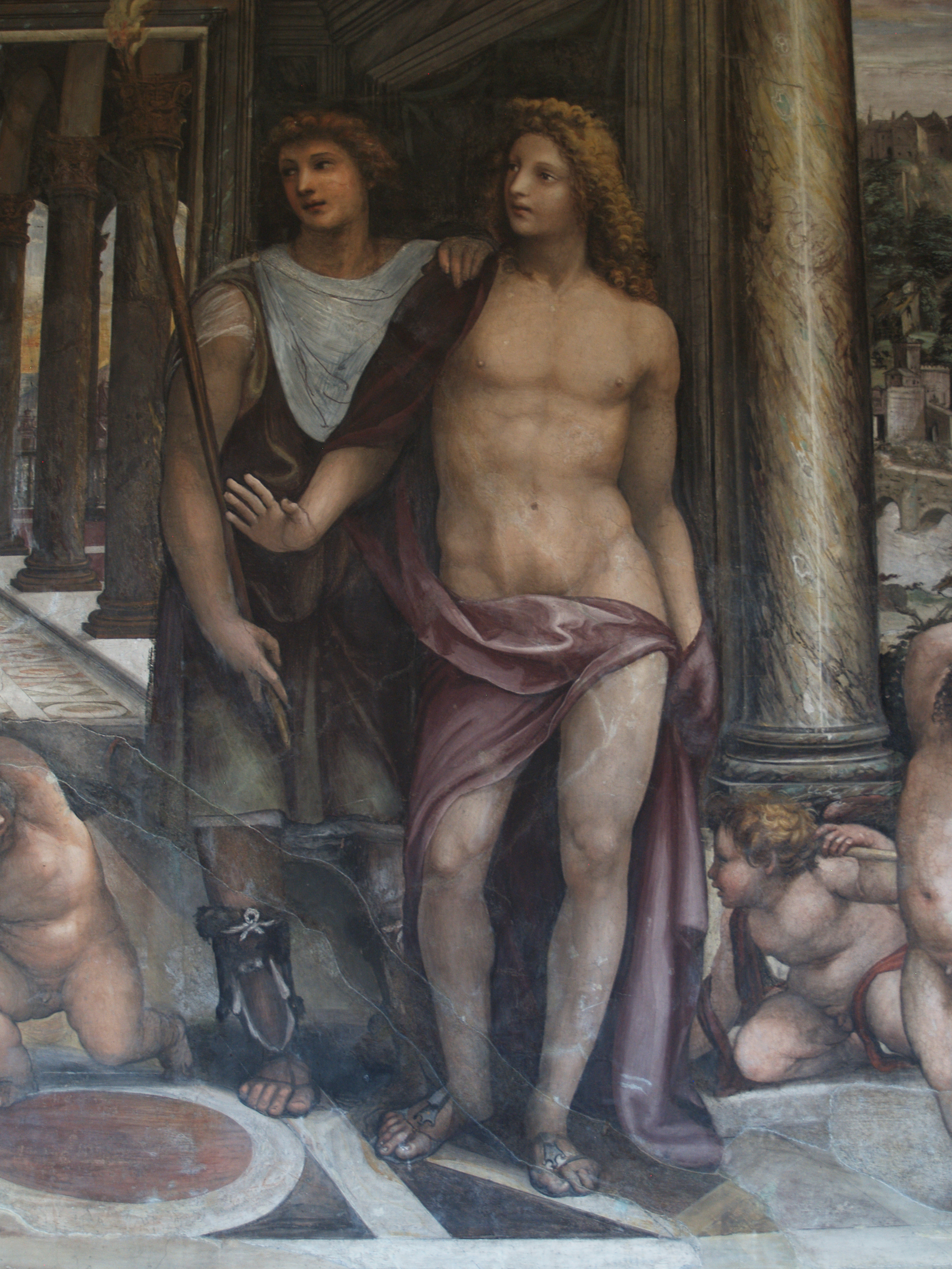 Roma, Villa Farnesina. Sala de Alejandro.